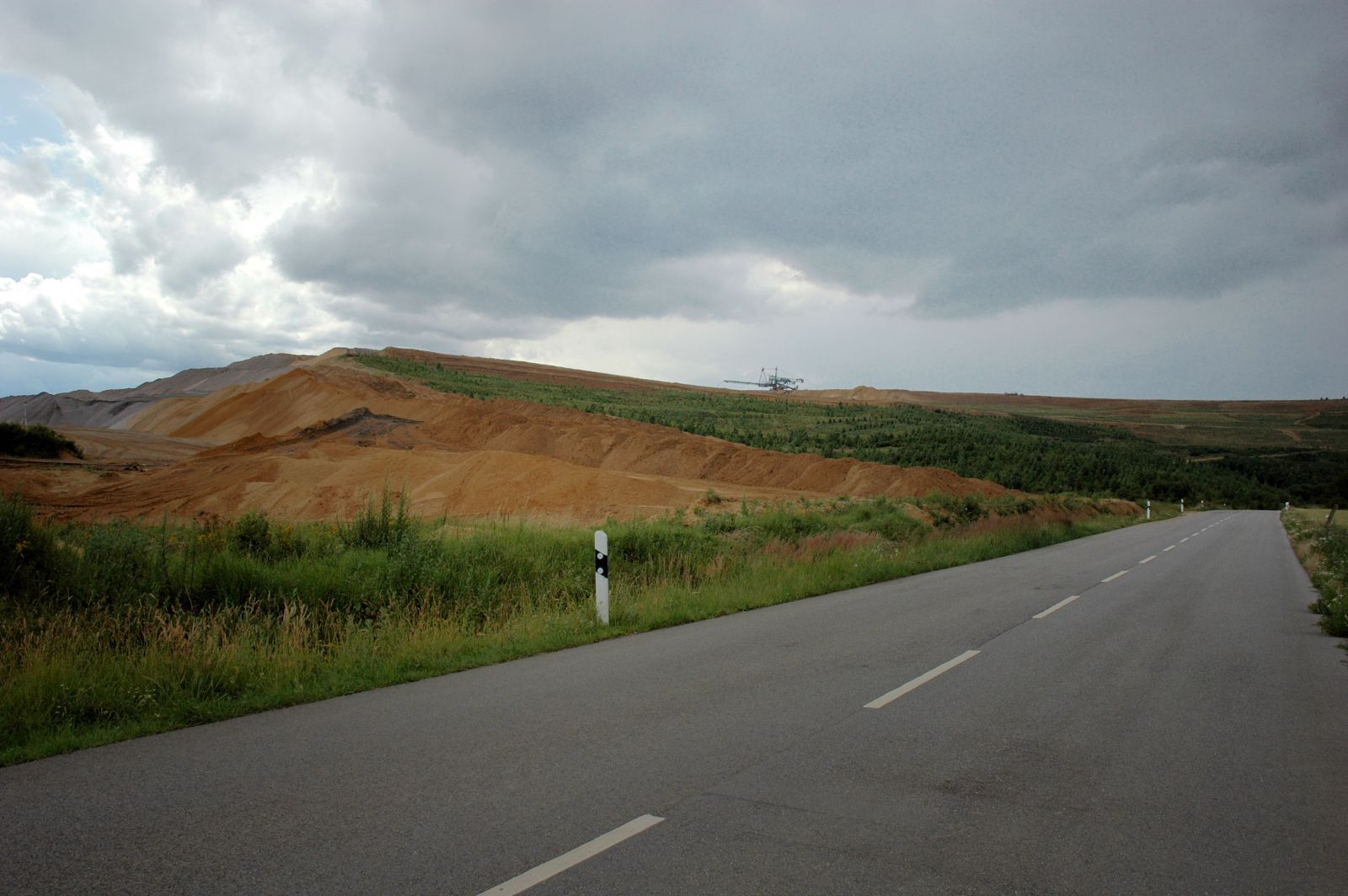 Sophienhöhe aus Süden, von wo aus die Sophienhöhe aufgeschüttet wird